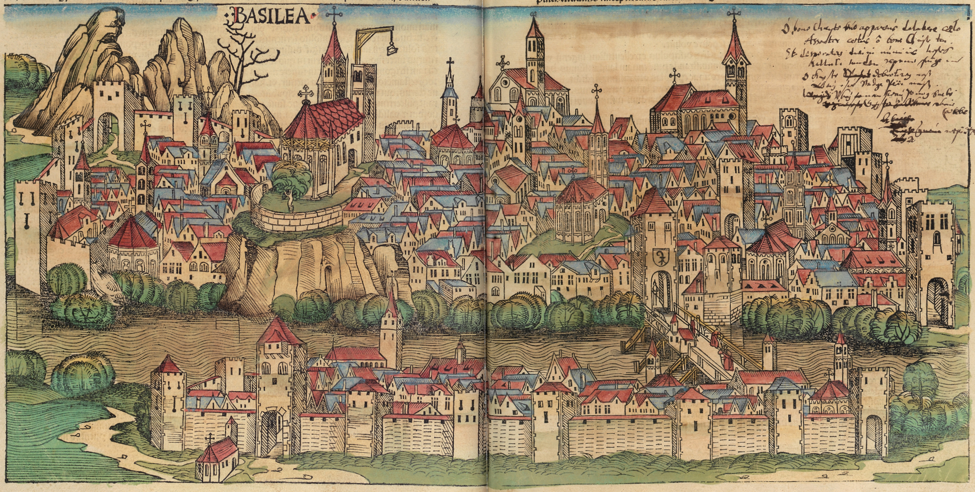 Ausschnitt aus einer Seite aus der Schedelschen Weltchronik (lateinische Ausgabe in Sao Paulo)